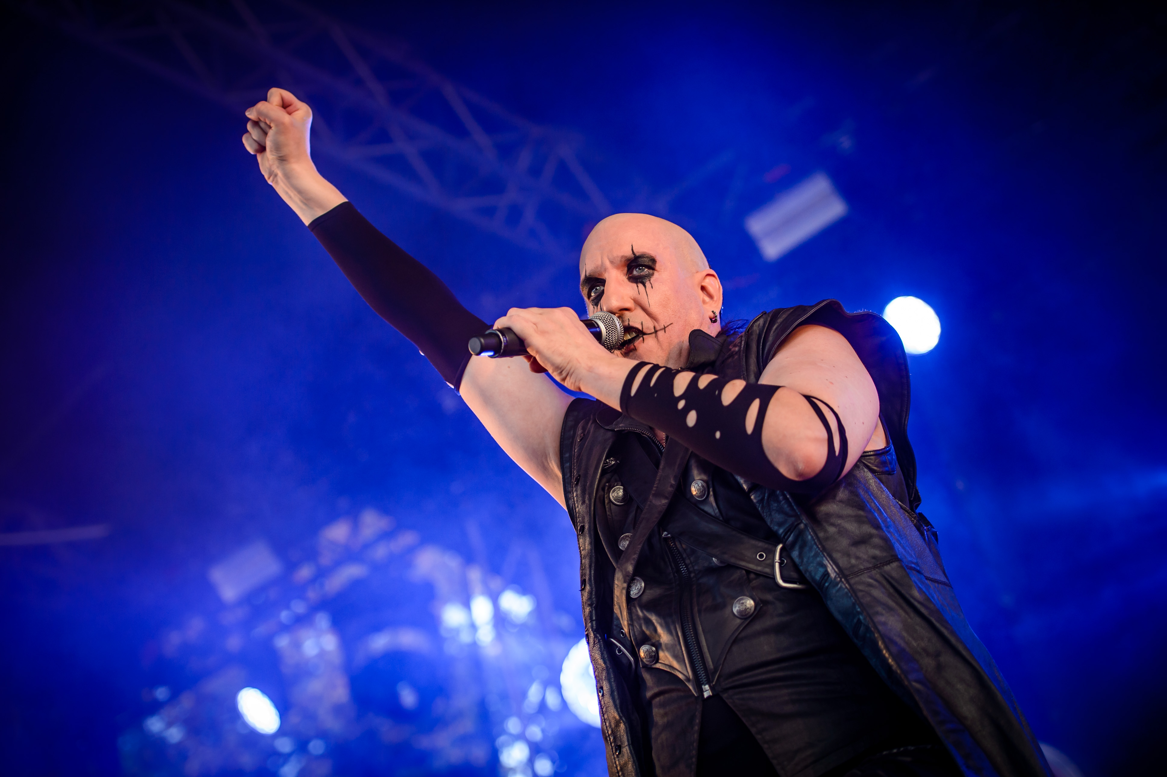 'Amphi Festival 2018; Tanzbrunnen Köln': 'ASP'